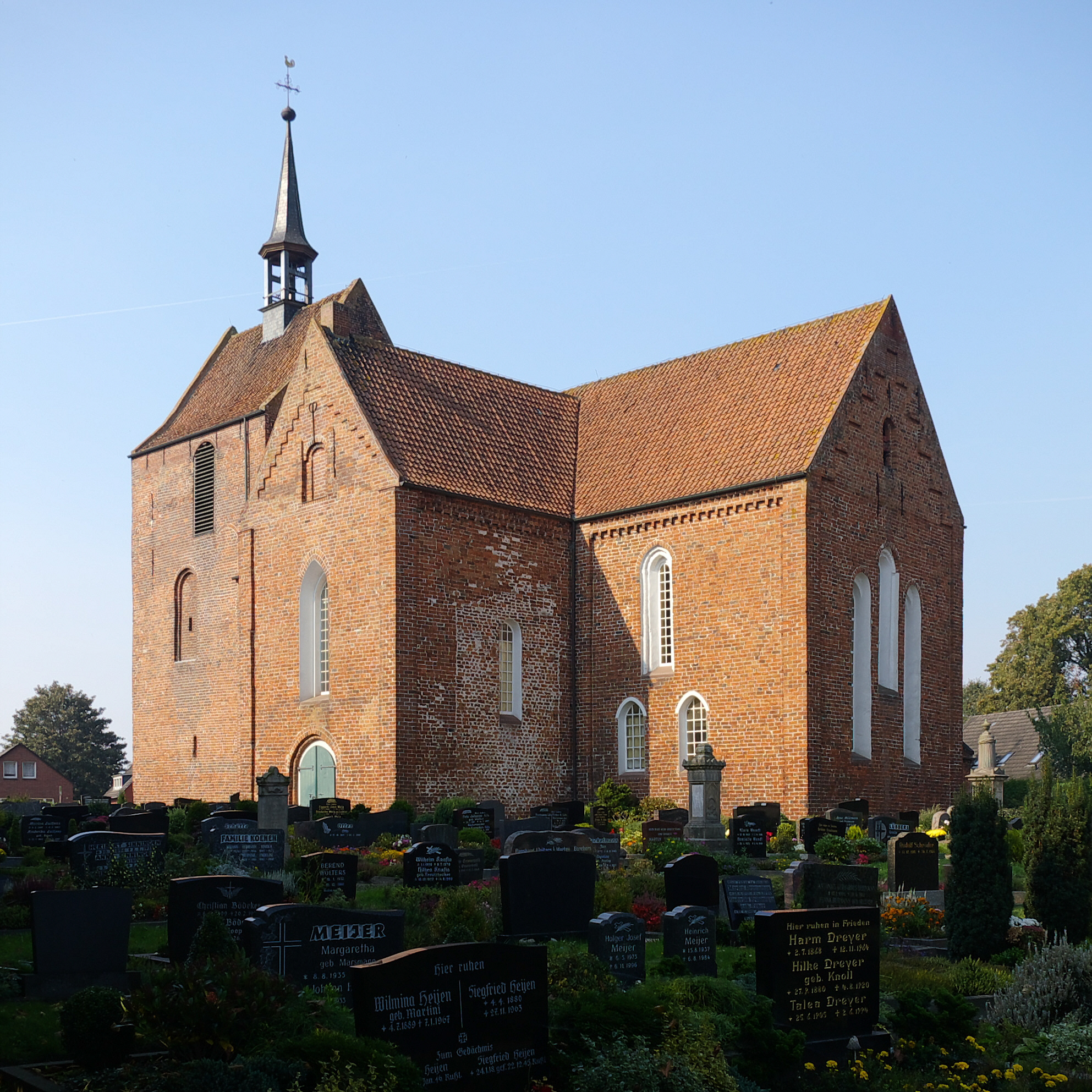 Kirche der ev.-reformierten Gemeinde in Stapelmoor, Landkreis Leer, Ostfriesland